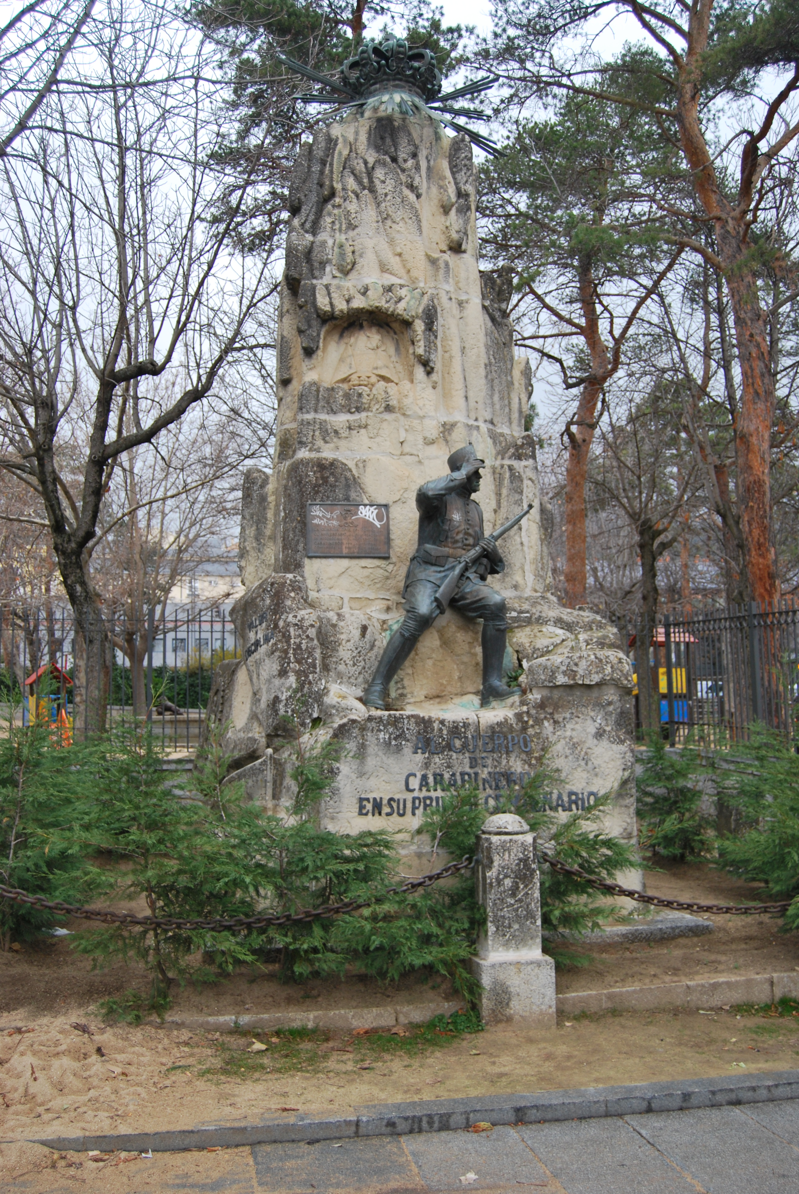 Monumento del Cuerpo de Carabineros, en San Lorenzo de El Escorial (Madrid, España). Obra de Rafael García Yrurozqui, realizada en 1929 en estilo modernista.